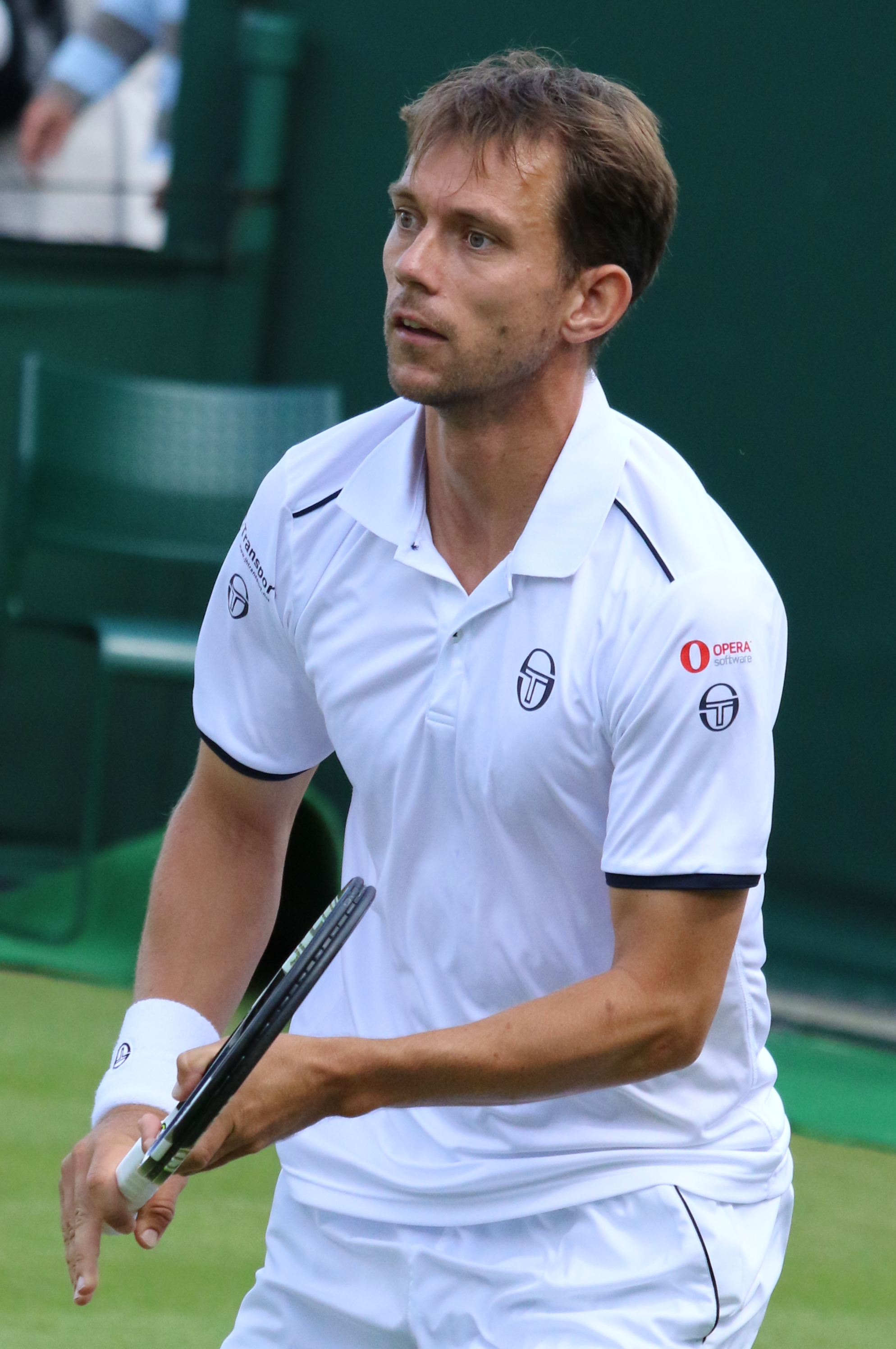 Nielsen WM16 (9)